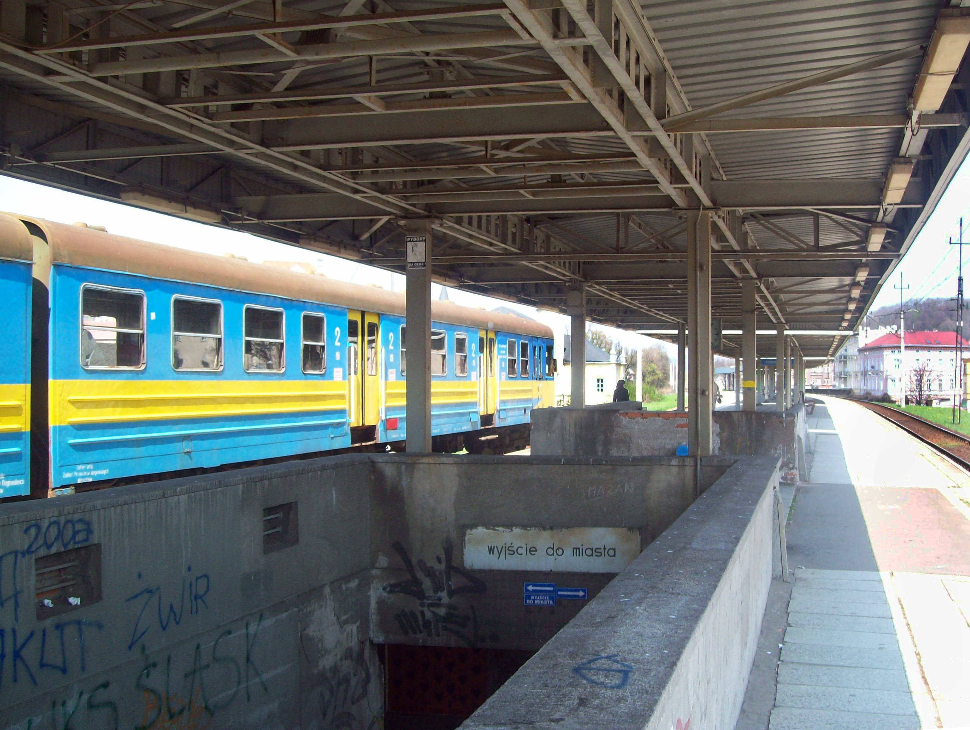 Pociąg Regio na przystanku Kłodzko Miasto z widocznym przejściem podziemnym.